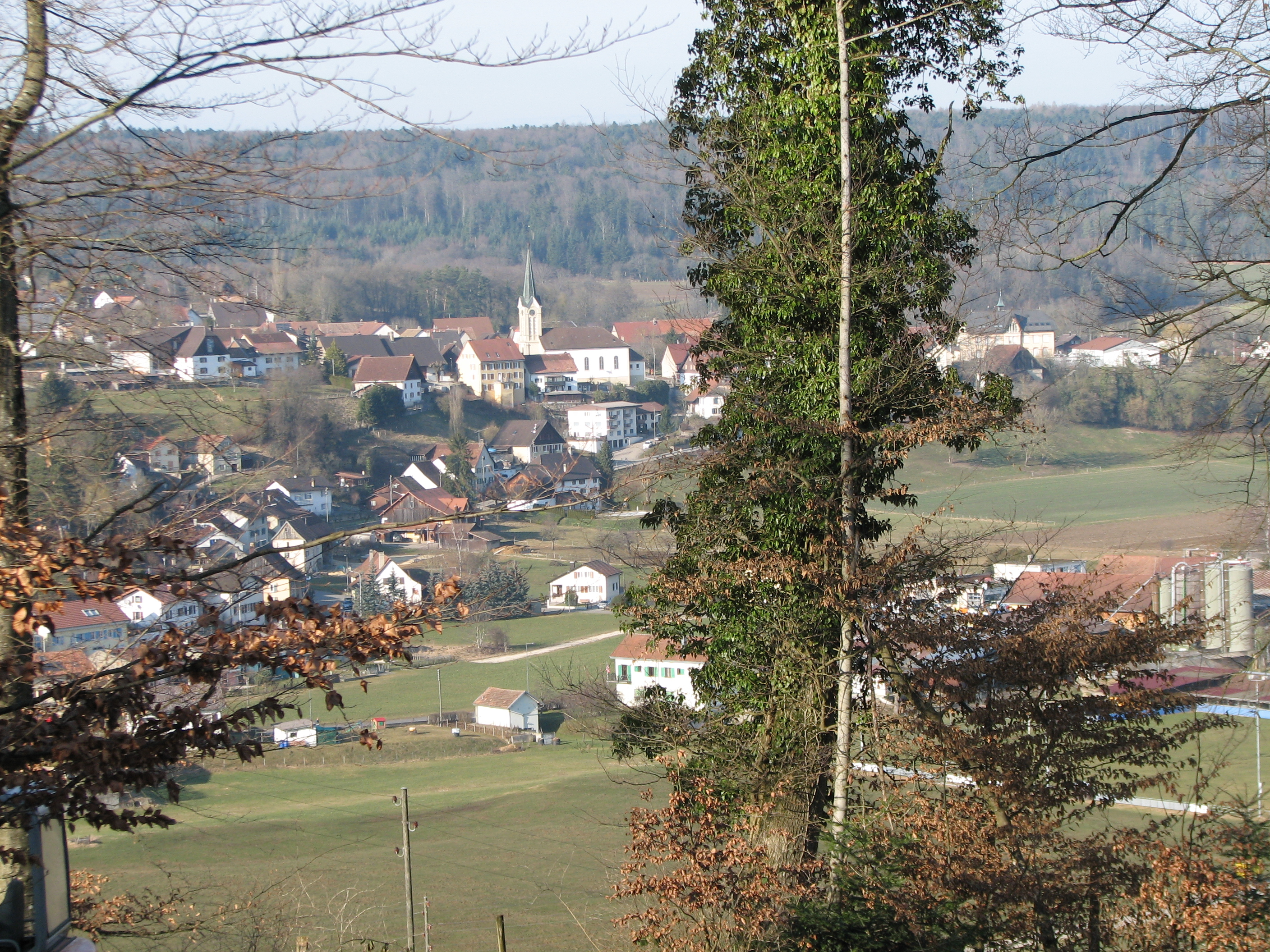 Courtedoux vue générale